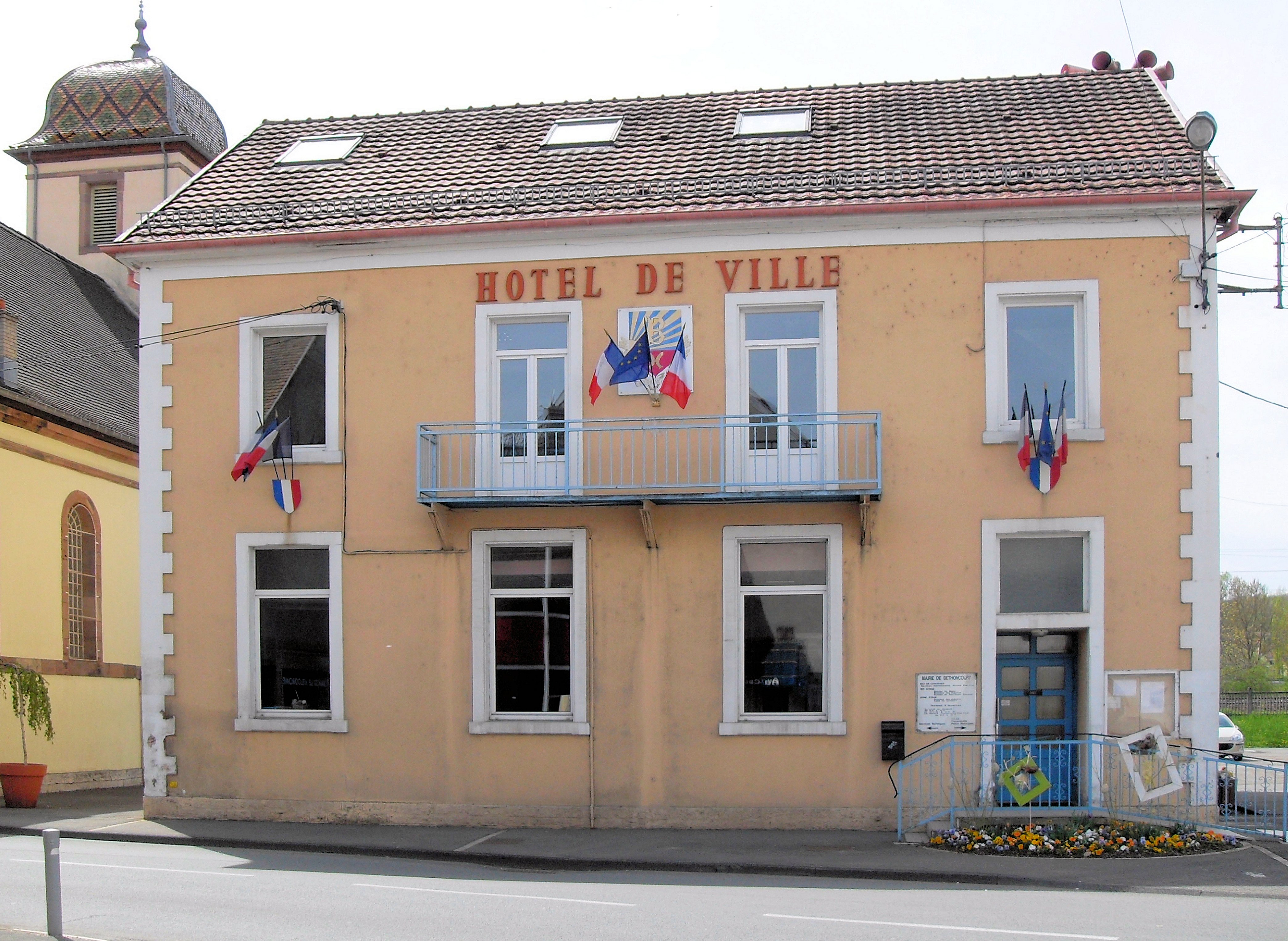 L'hôtel de ville de Bethoncourt